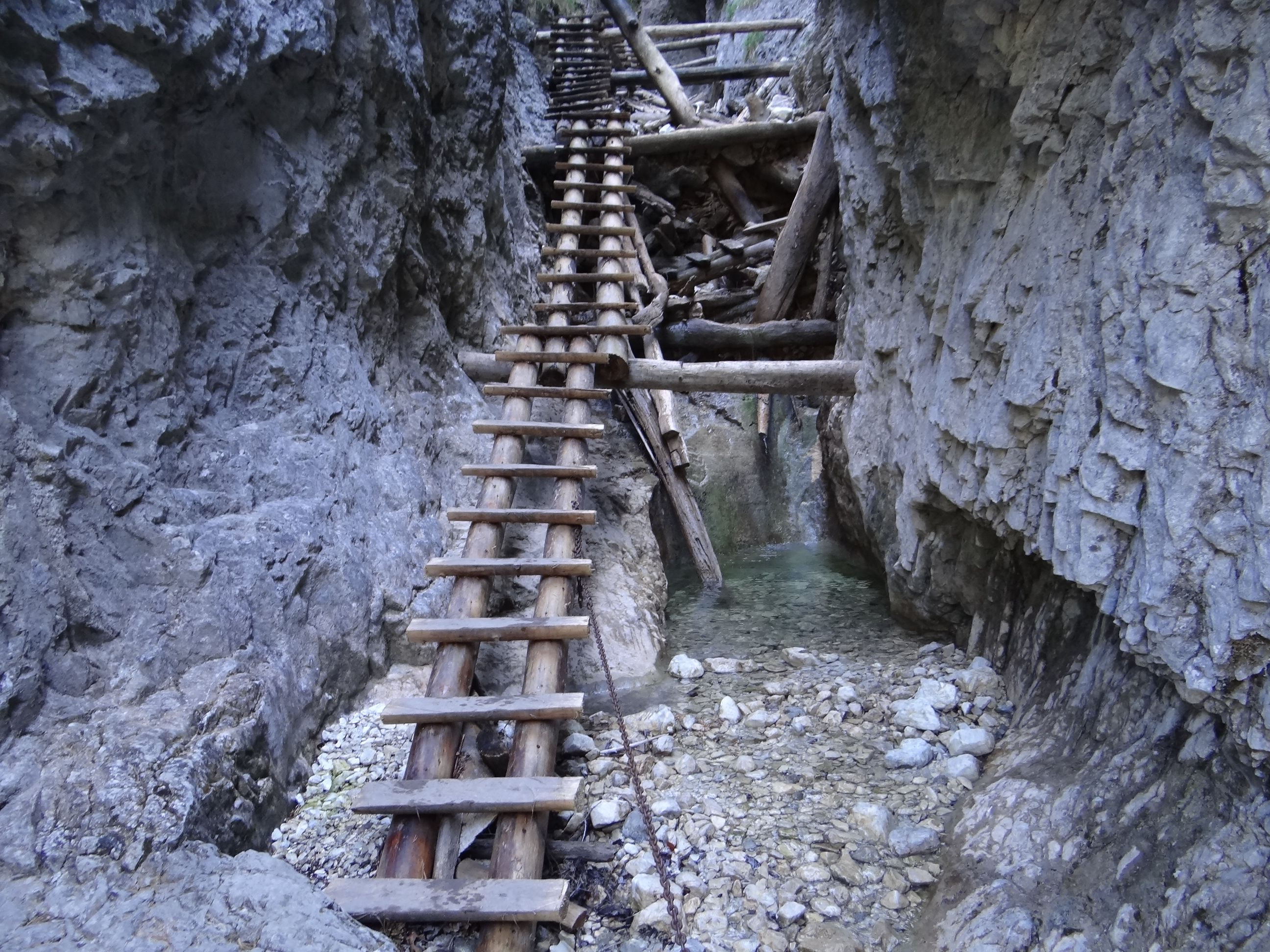 Piecky